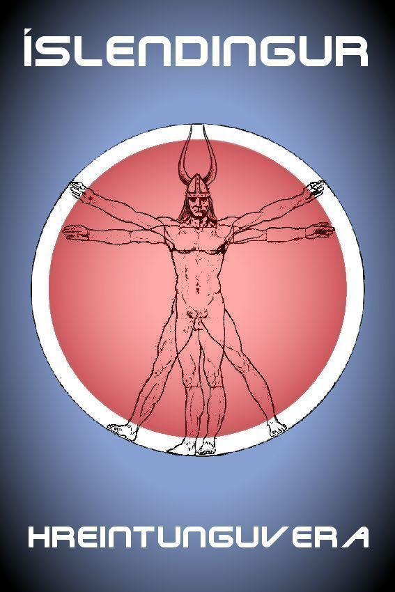 Hreintunguvera